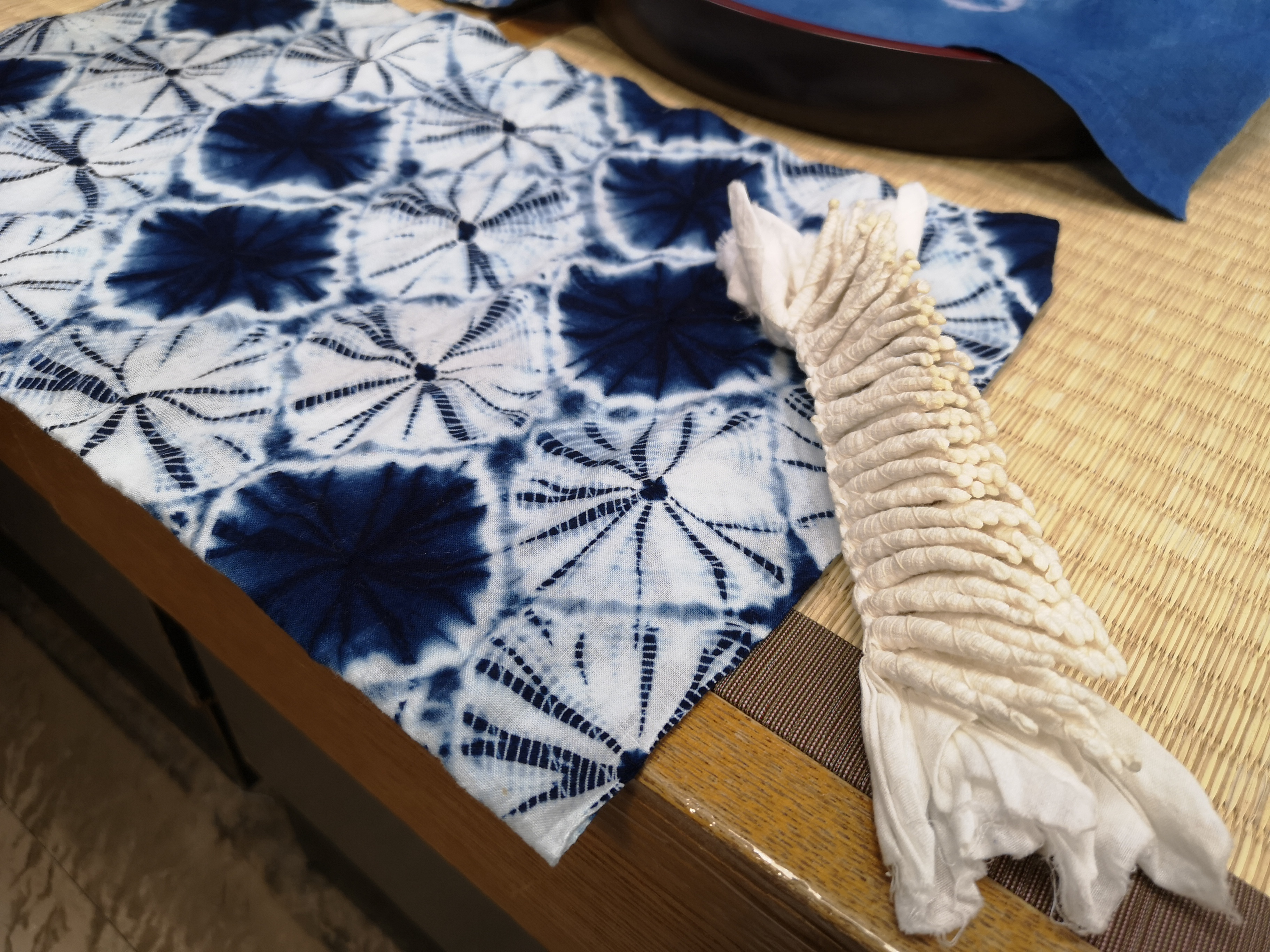 有松絞りの「手蜘蛛絞」のくくった布と、染色後の完成品。